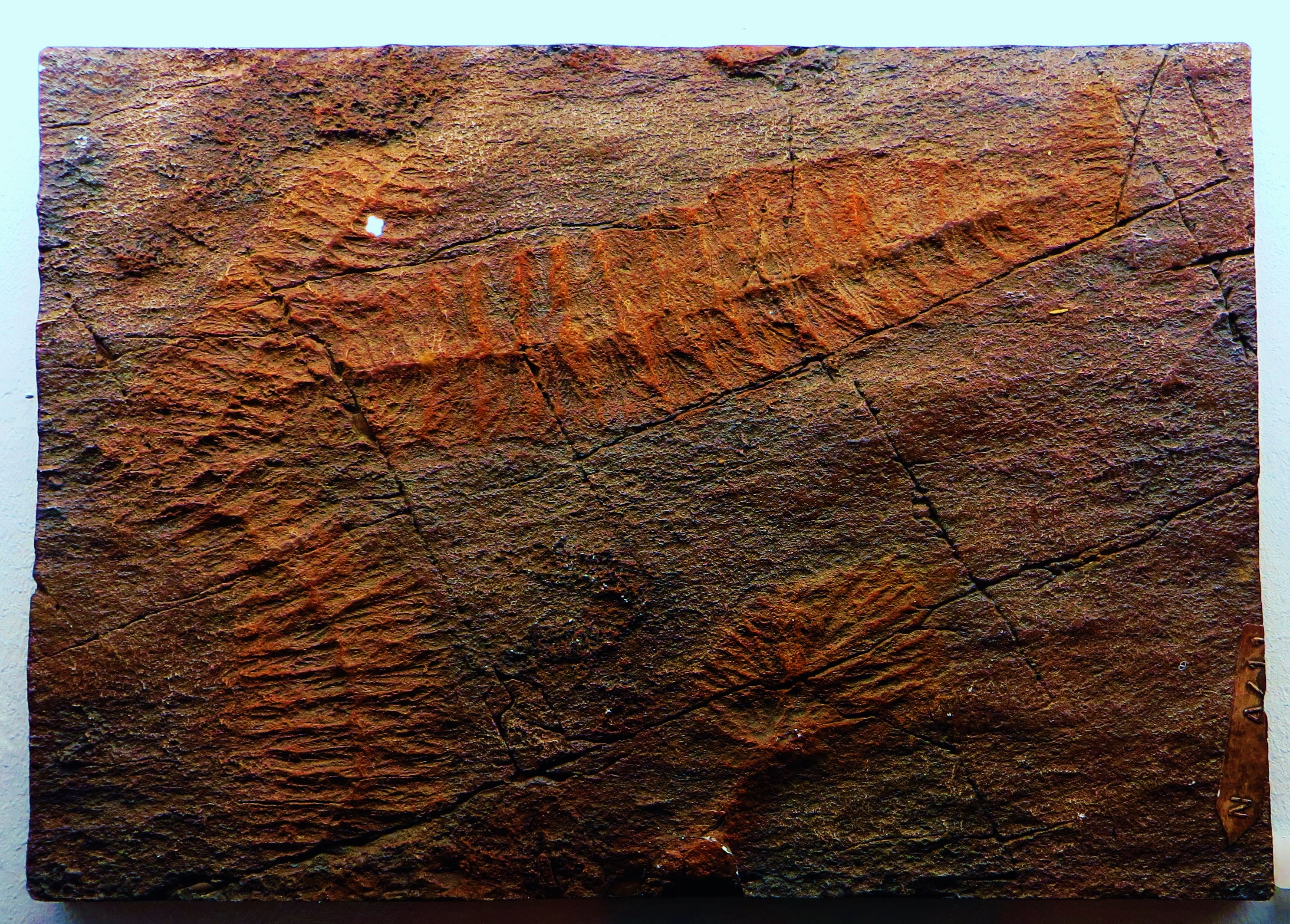 Fossil of Rangea, an ancient being- Took the picture at Museum of Paleontology of Tuebingen